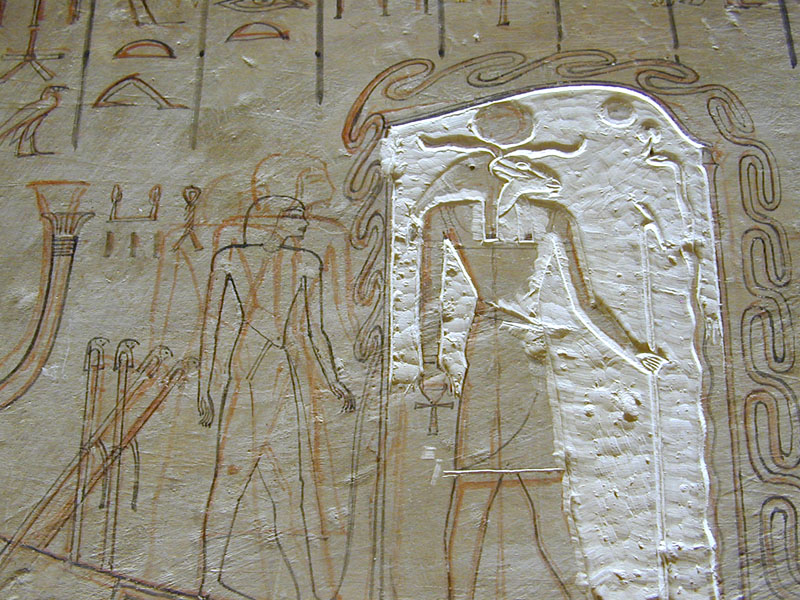 Le dieu du soleil à tête de bélier debout dans un naos protégé par le serpent-Mehen sur la barque solaire. Séquences du Livre des Portes, l'un des plus importants recueils funéraires royaux du Nouvel Empire. Il apparait pour la première fois dans la tombe d'Horemheb.